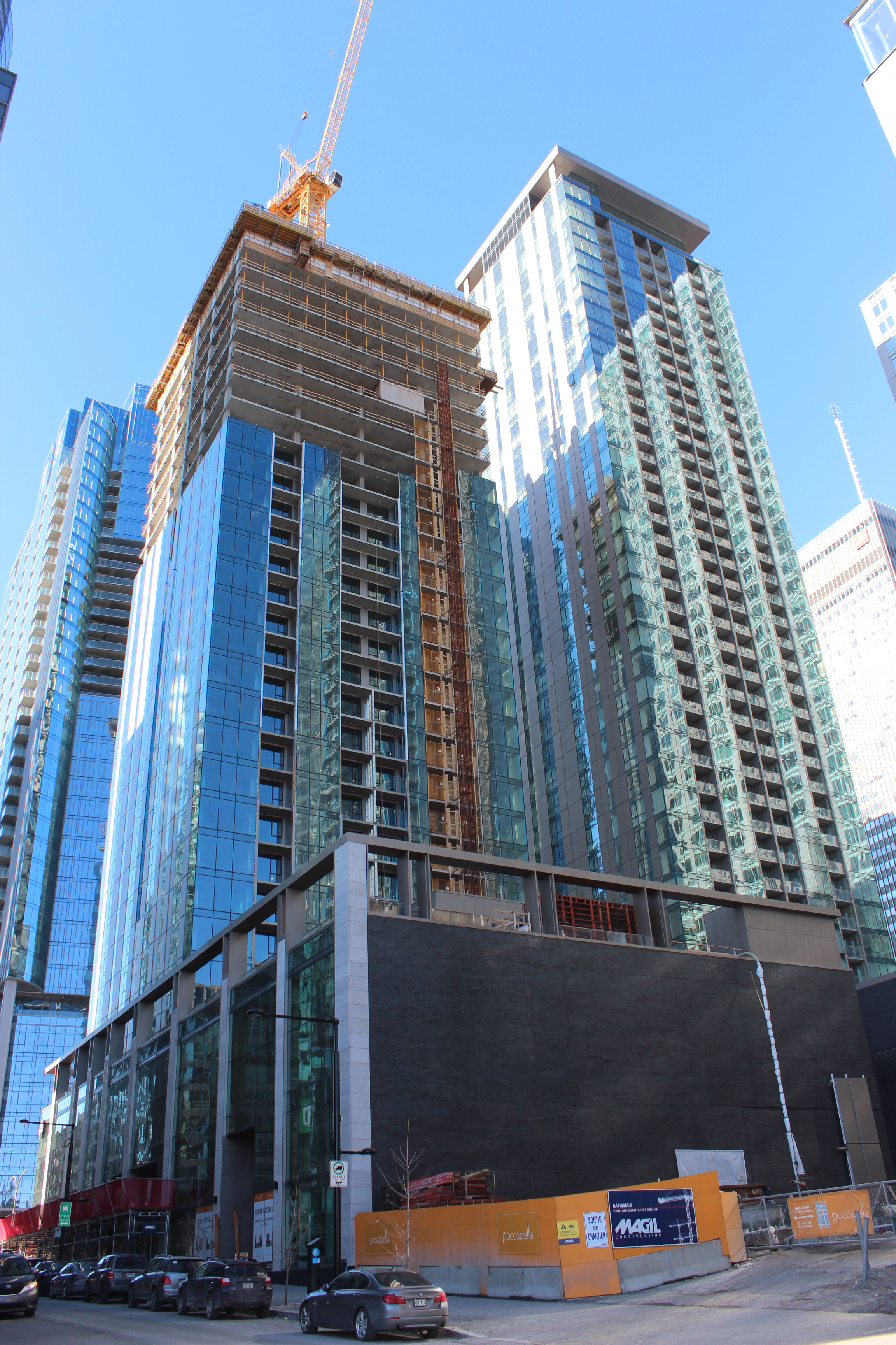 La tour jumelle Rocabella en construction.